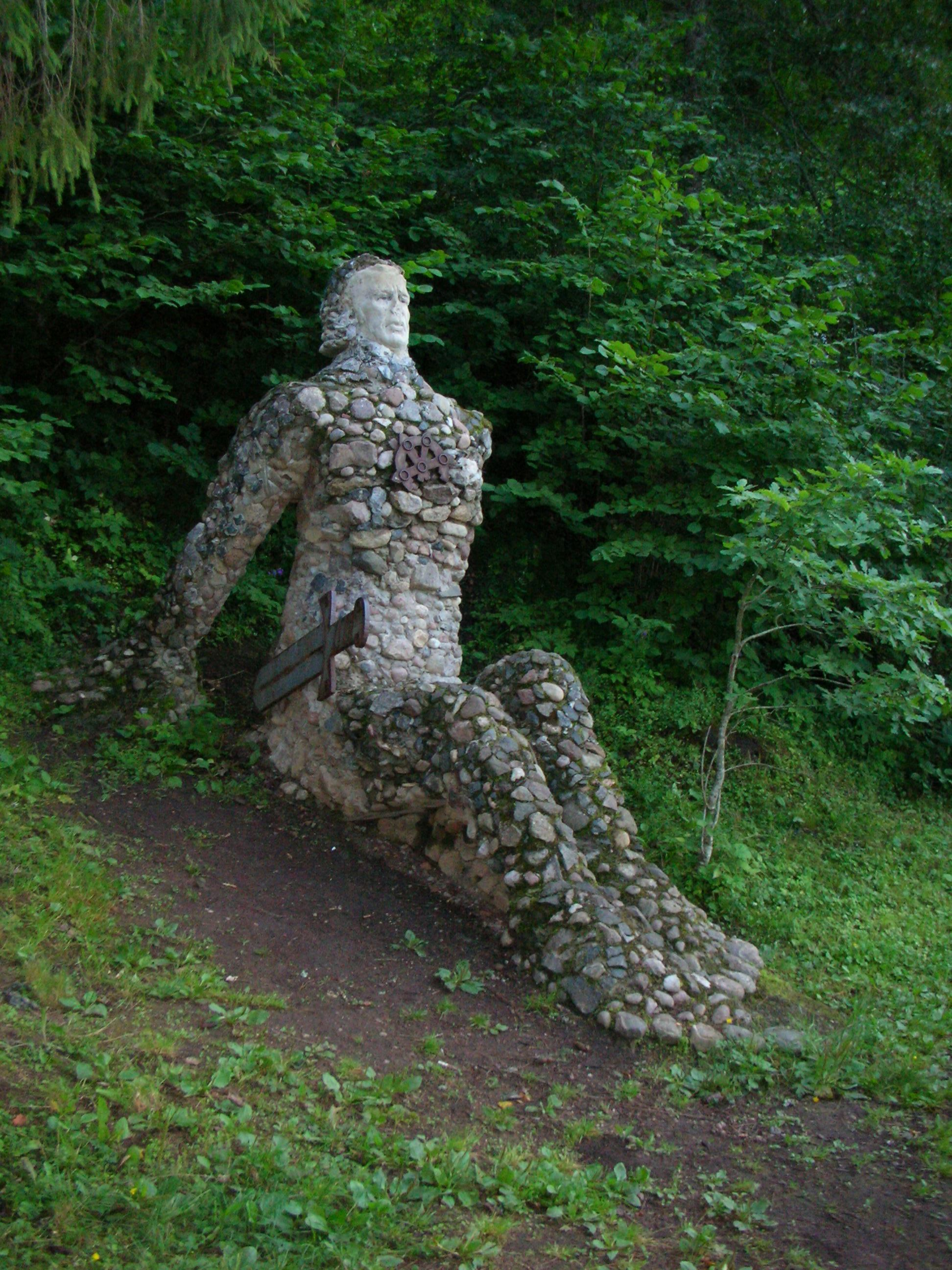 Kalevipoeg statue at Neeruti